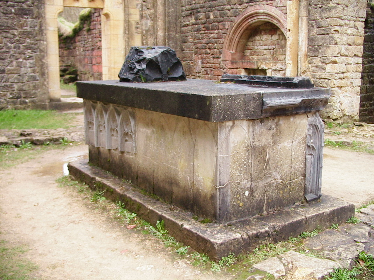 Abbaye d'Orval (Belgique), tombeau de Wenceslas de Bohême, duc de Luxembourg, de Brabant, de Limbourg, et marquis du Saint Empire Romain Germanique (1337-1383) dans les ruines de l'ancienne abbatiale Photo prise par F5ZV fin avril 2006